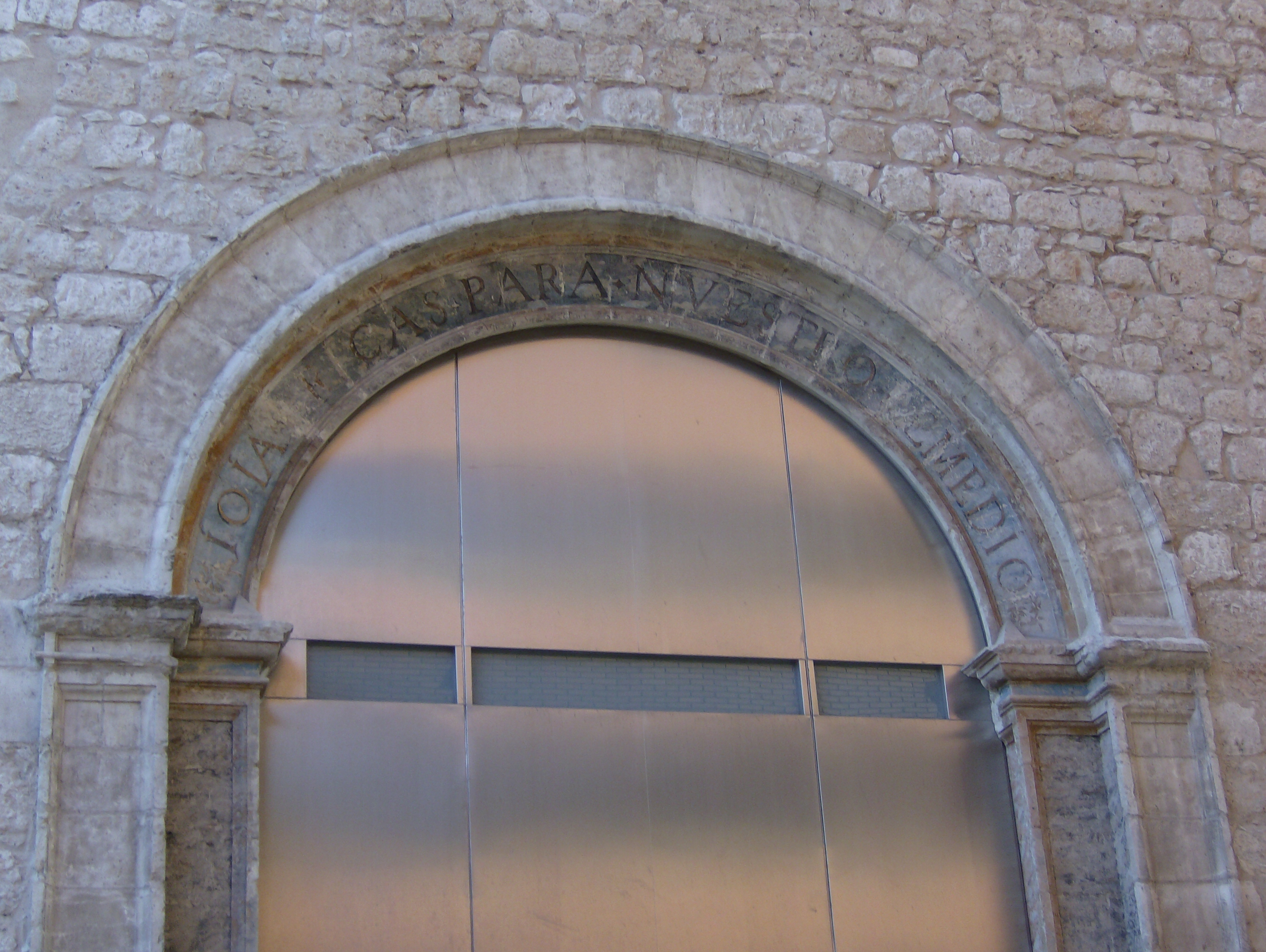 Iglesia de San Agustín (Valladolid)